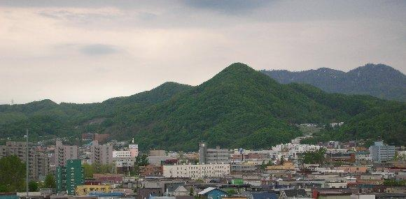 a view of Mt.Sankakuyama in summer